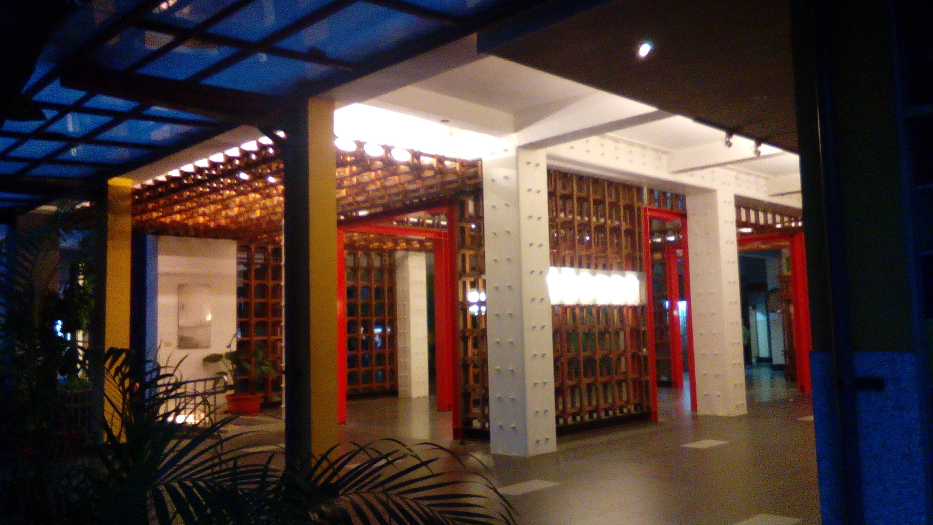 由102級室內設計系學生所設計 並得過德國紅點設計獎